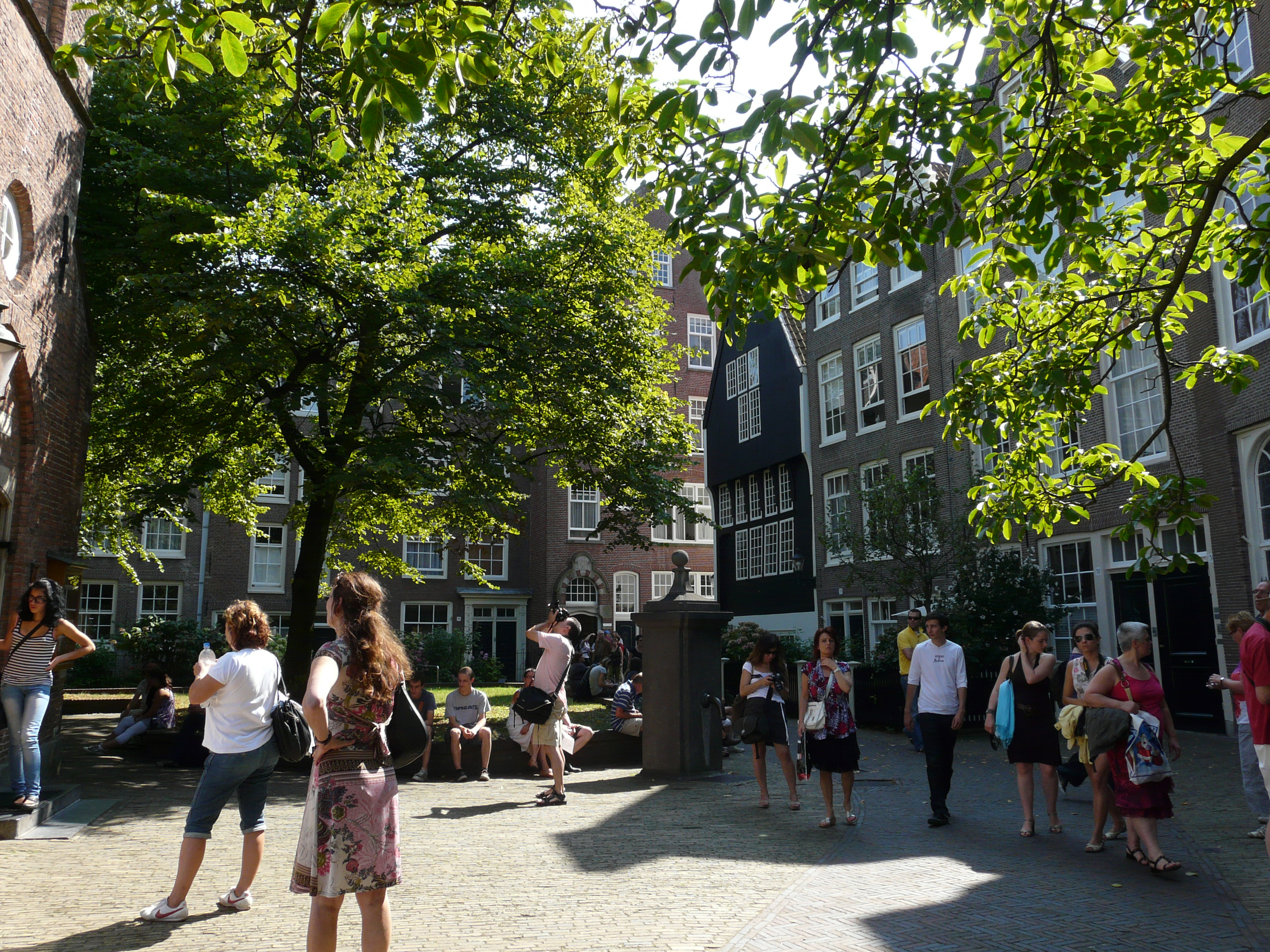 Begijnhof Amsterdam